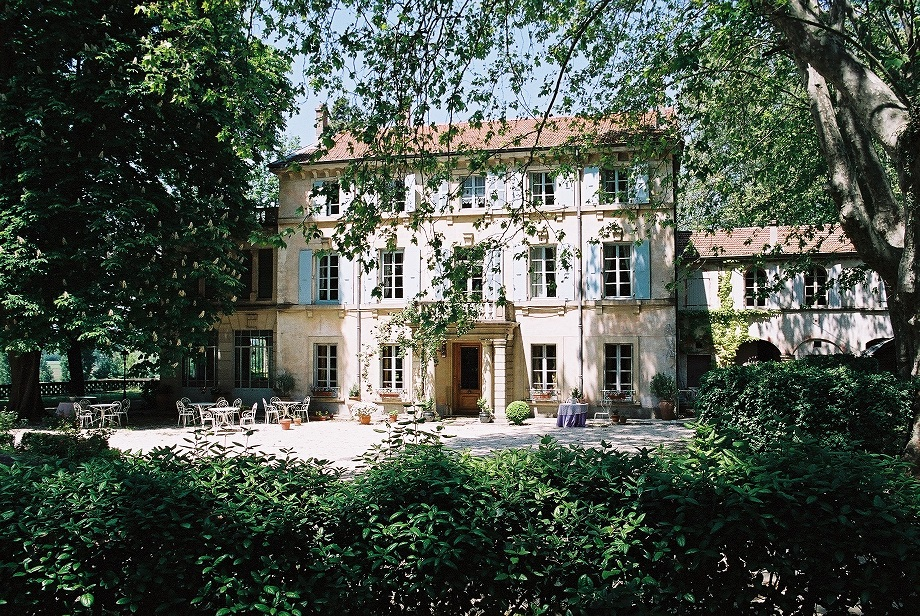 Facade sud du Manoir le Roure